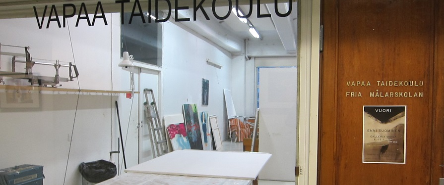 Kuva Vapaan Taidekoulun ulkopuolelta